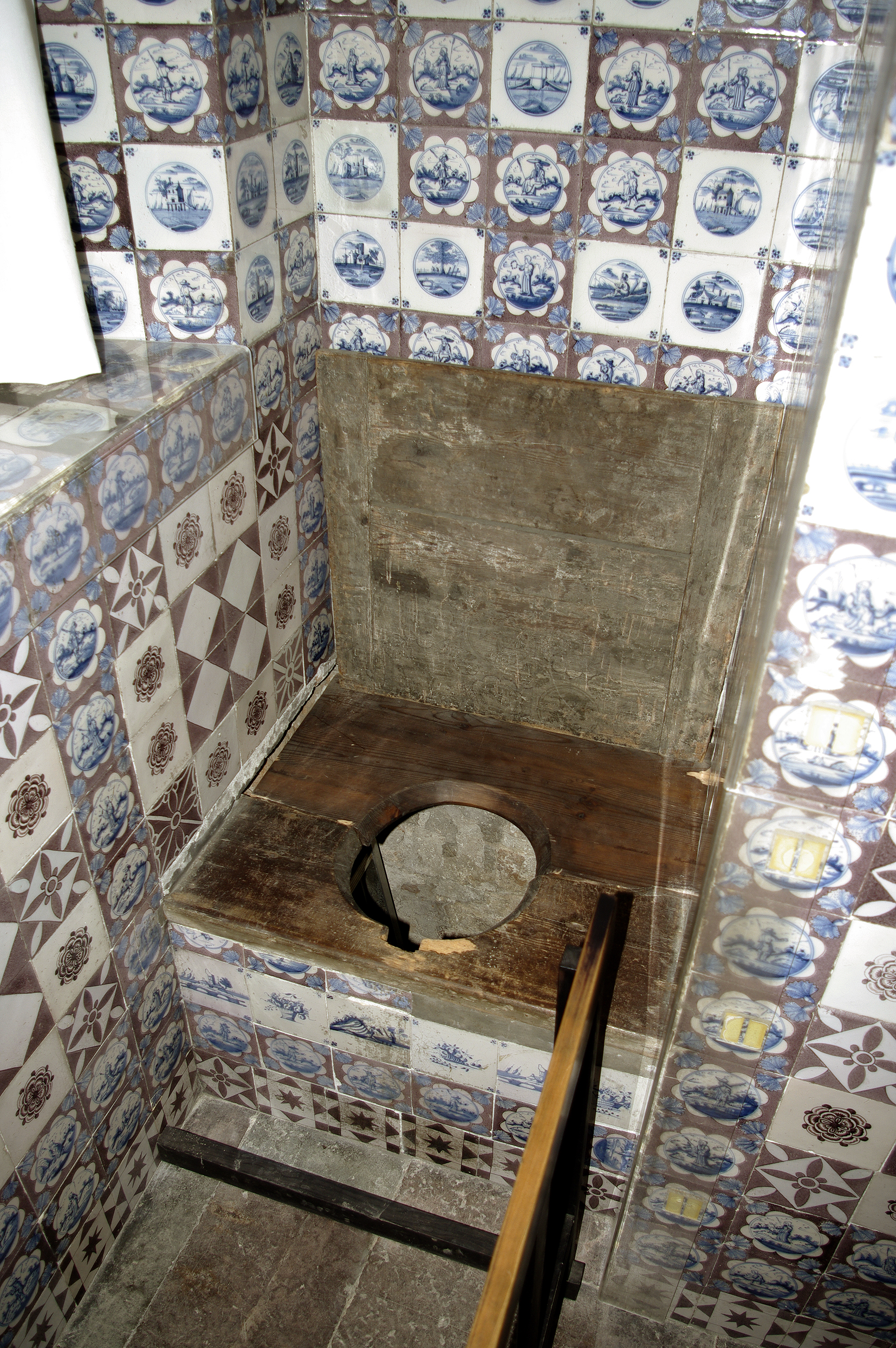 Christian IV's toilet at Rosenborg Castle from about 1620.